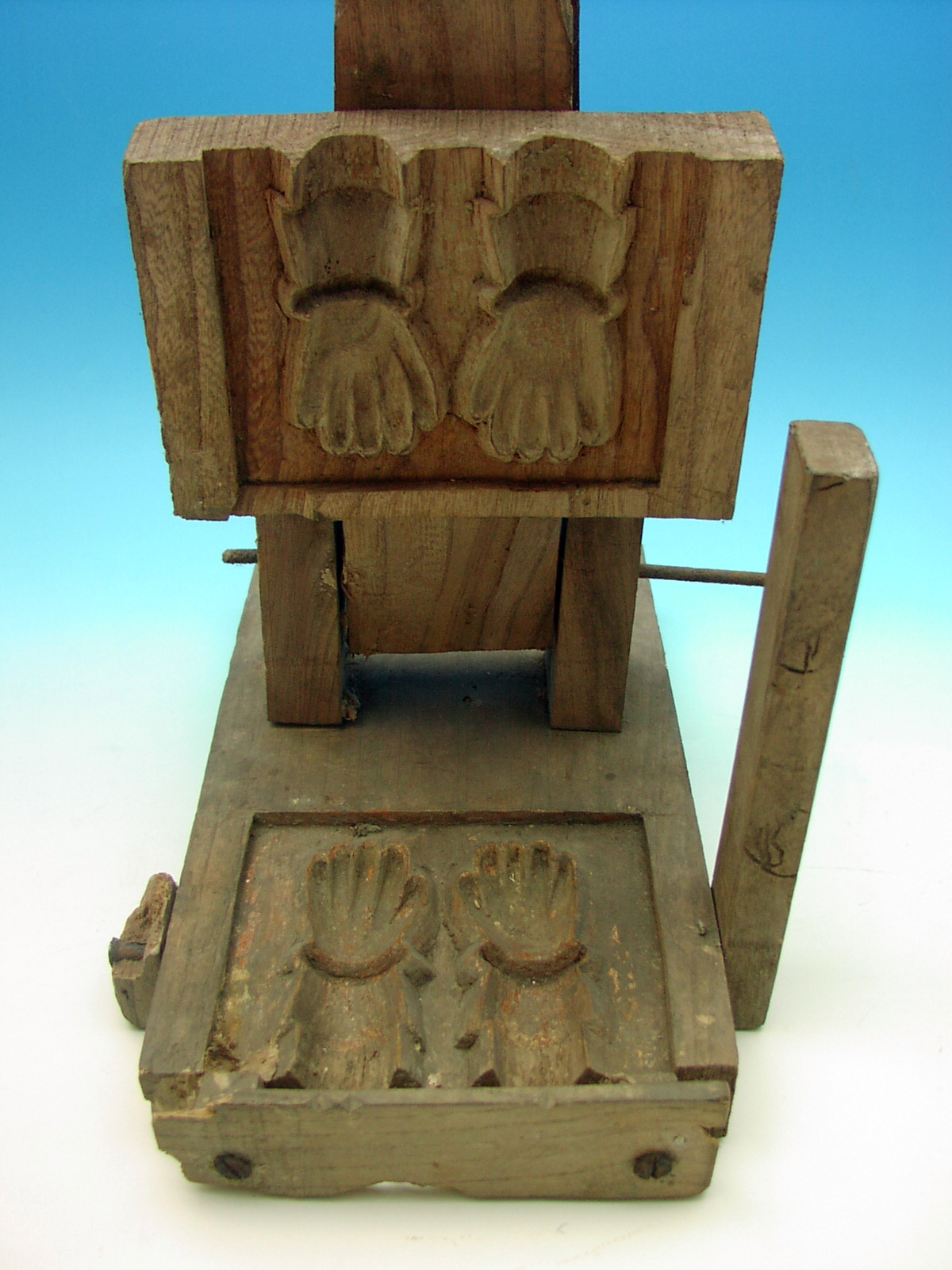 Maschine zur Herstellung von Händen, Dauerausstellung Fichtelgebirgsmuseum, Fichtelgebirgsmuseum 2006